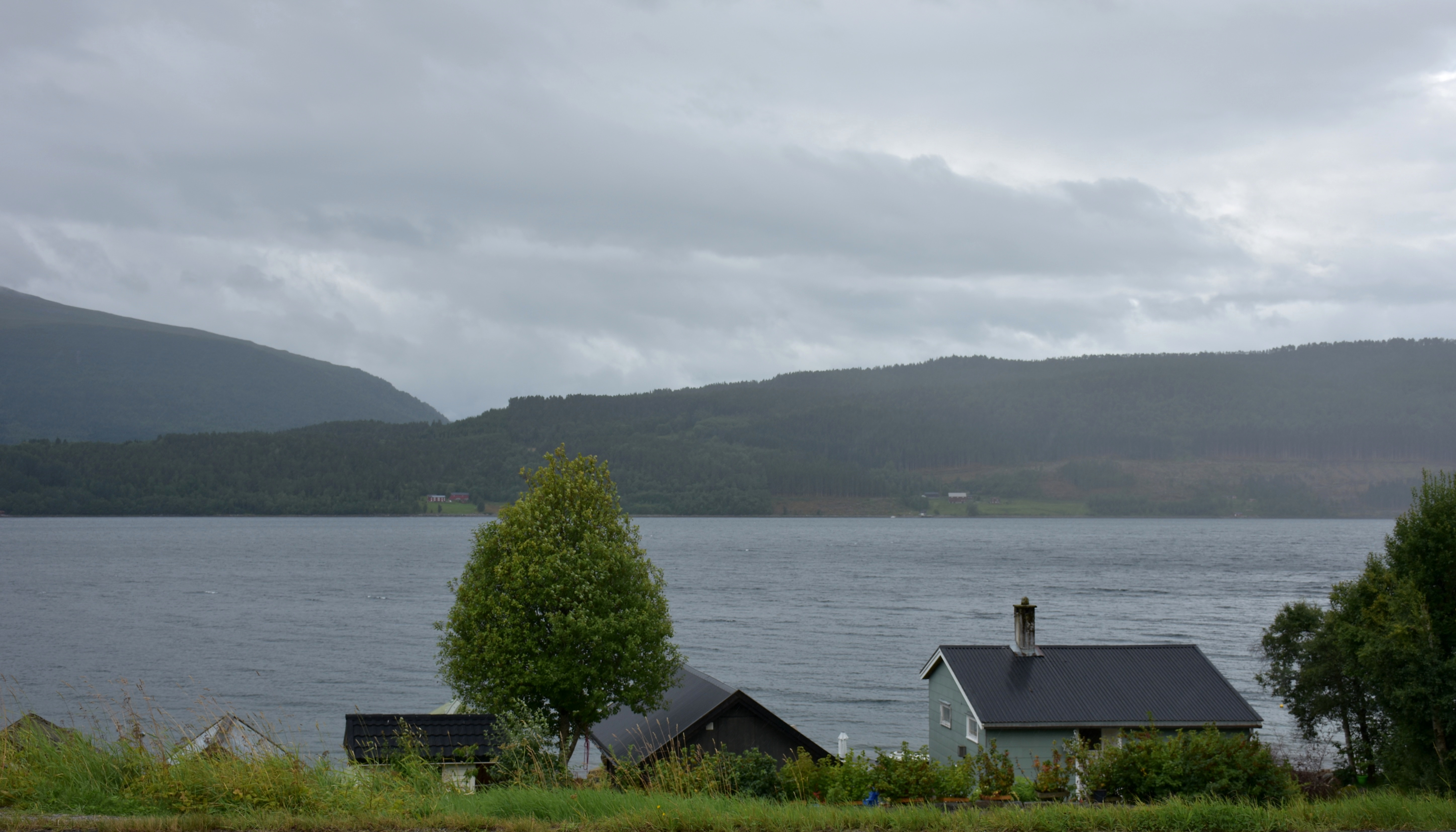 Fannefjorden ved Hjelset